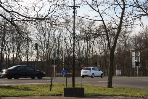 Das Kreuz Ecke Arnoldsweilerweg/Schoellerstr. in Düren